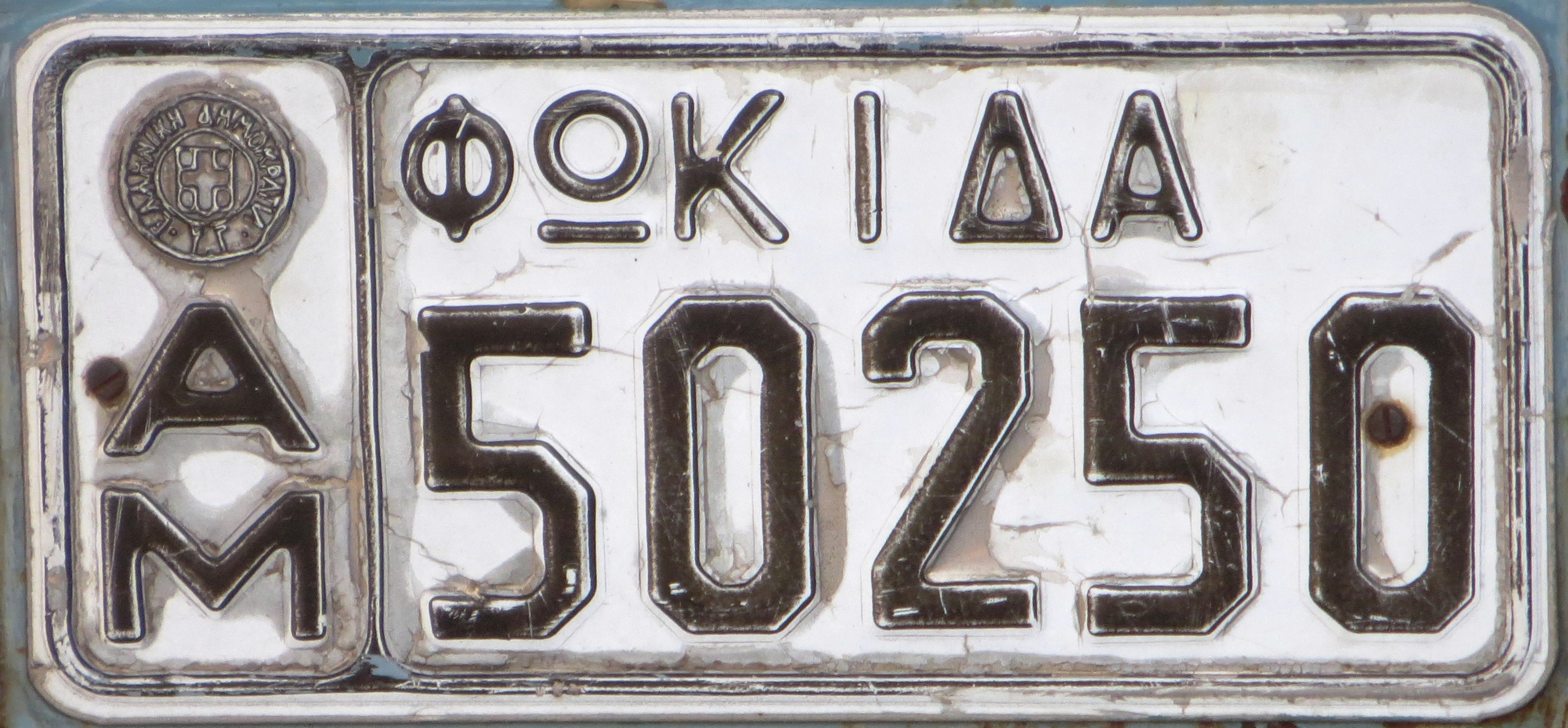 Grieks landbouw kentekenplaat